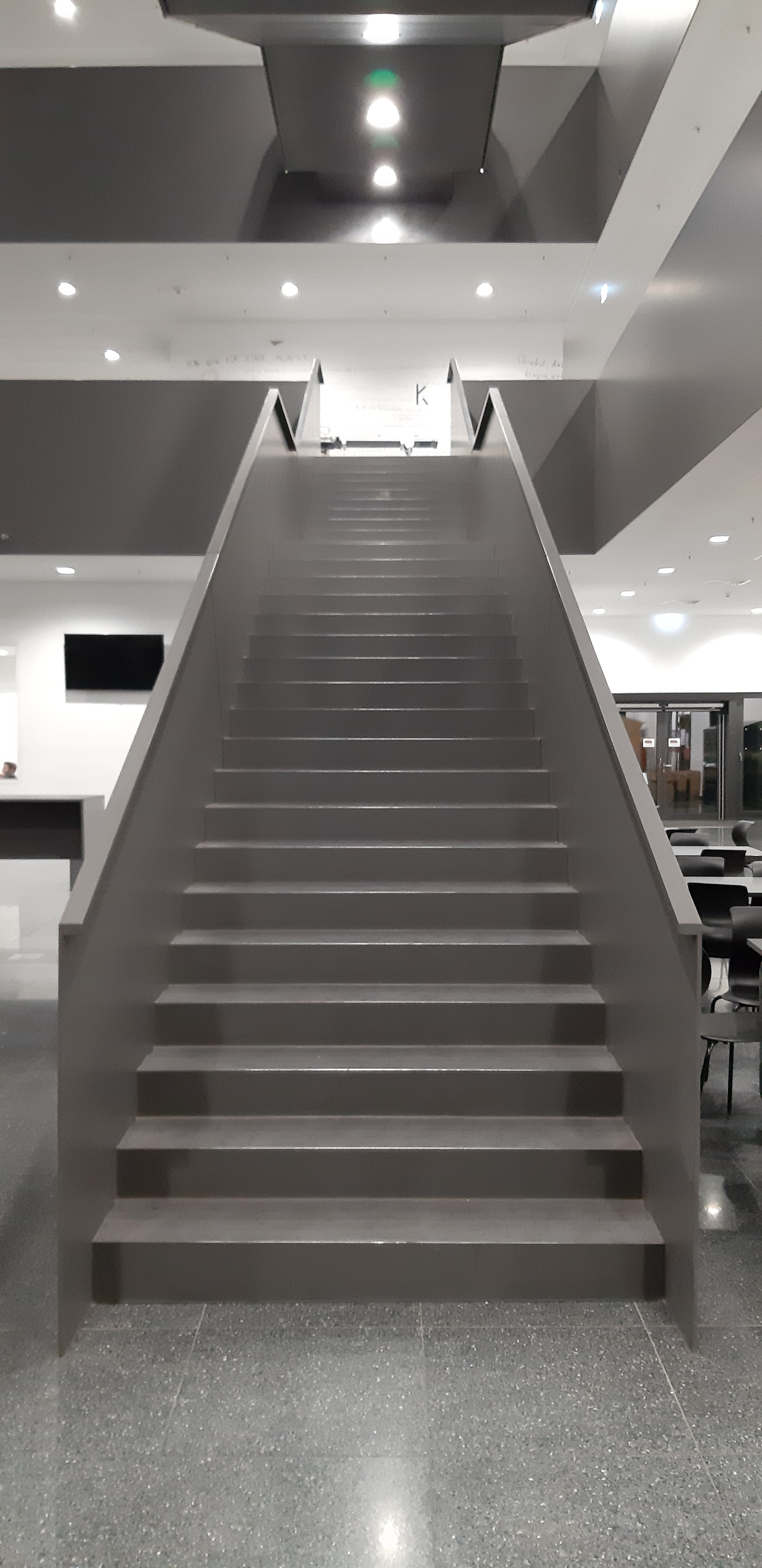 Hochschule